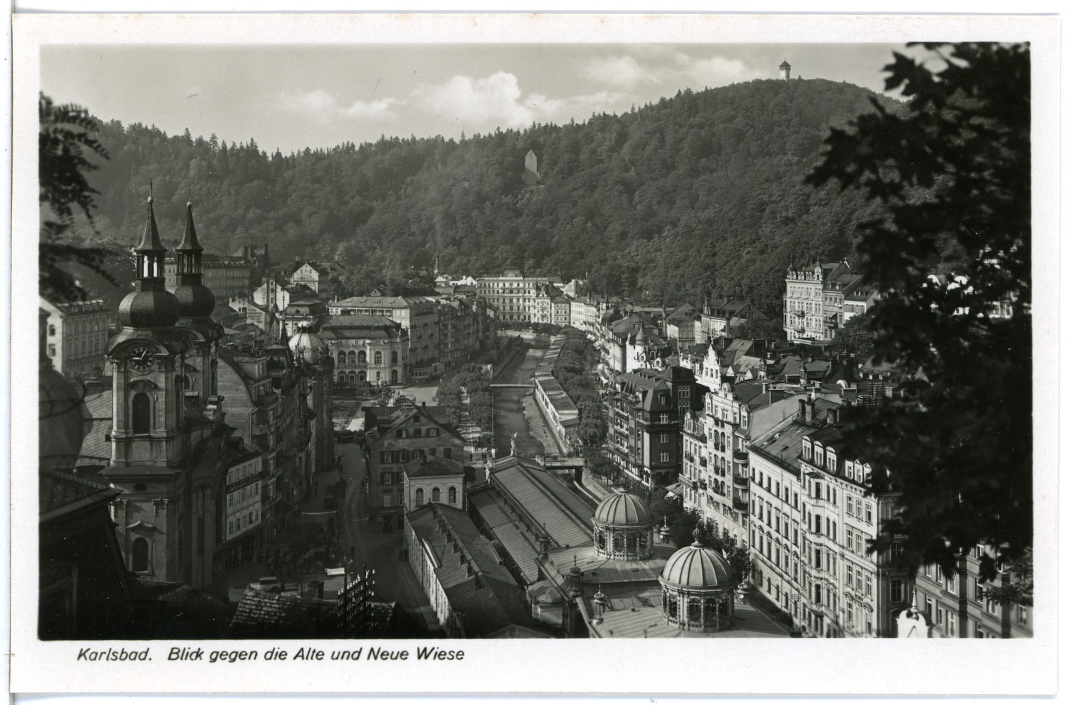 Karlsbad; Blick gegen die alte und neue Wiese This postcard is from publisher Brück & Sohn in Meißen ( postcard has a unique number 25546 and is available in a higher resolution at the publisher. This images was uploaded in a cooperation project between Wikipedians and the publisher.